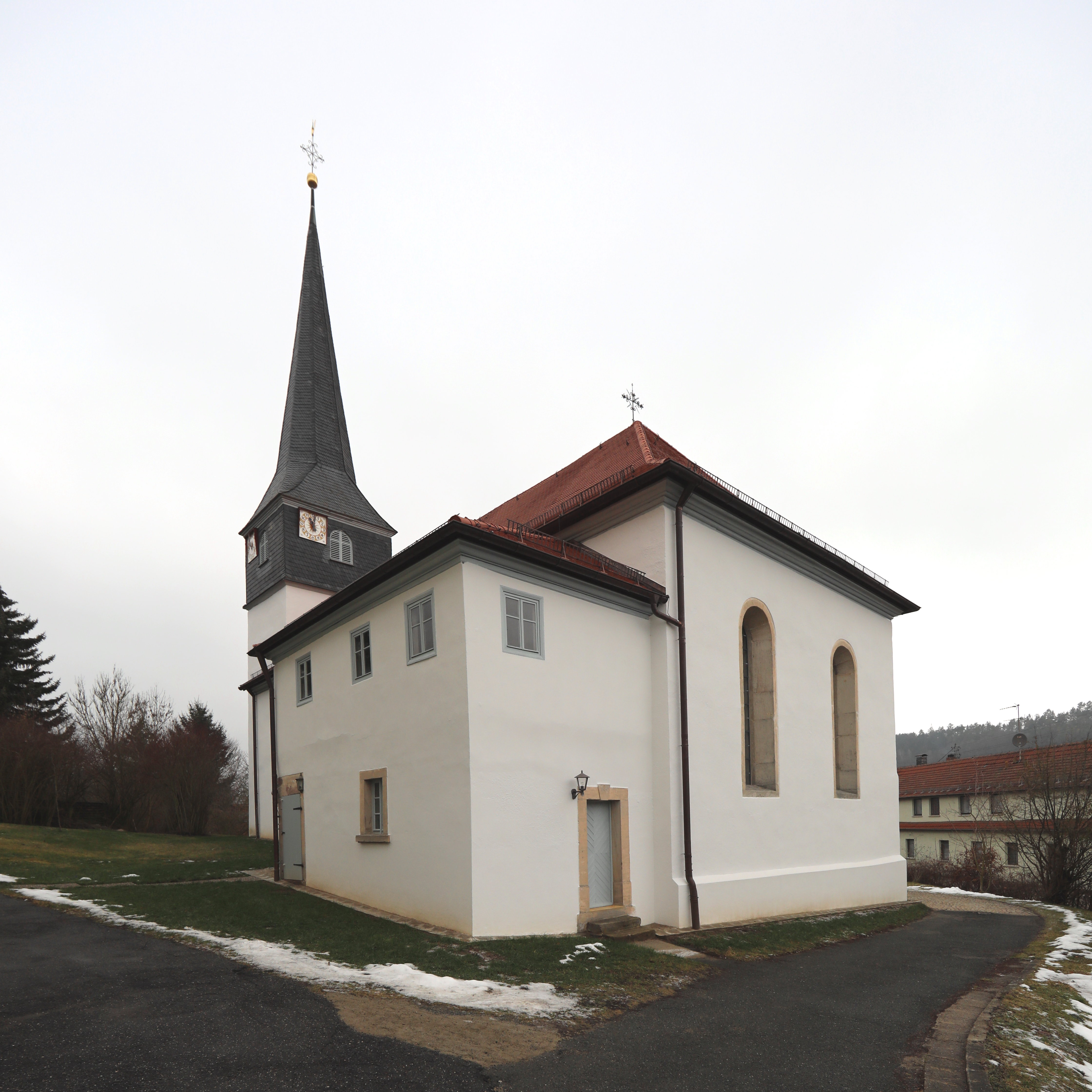 ev. Pfarrkirche St. Jakobus in Fischbach, Ot von Kronach